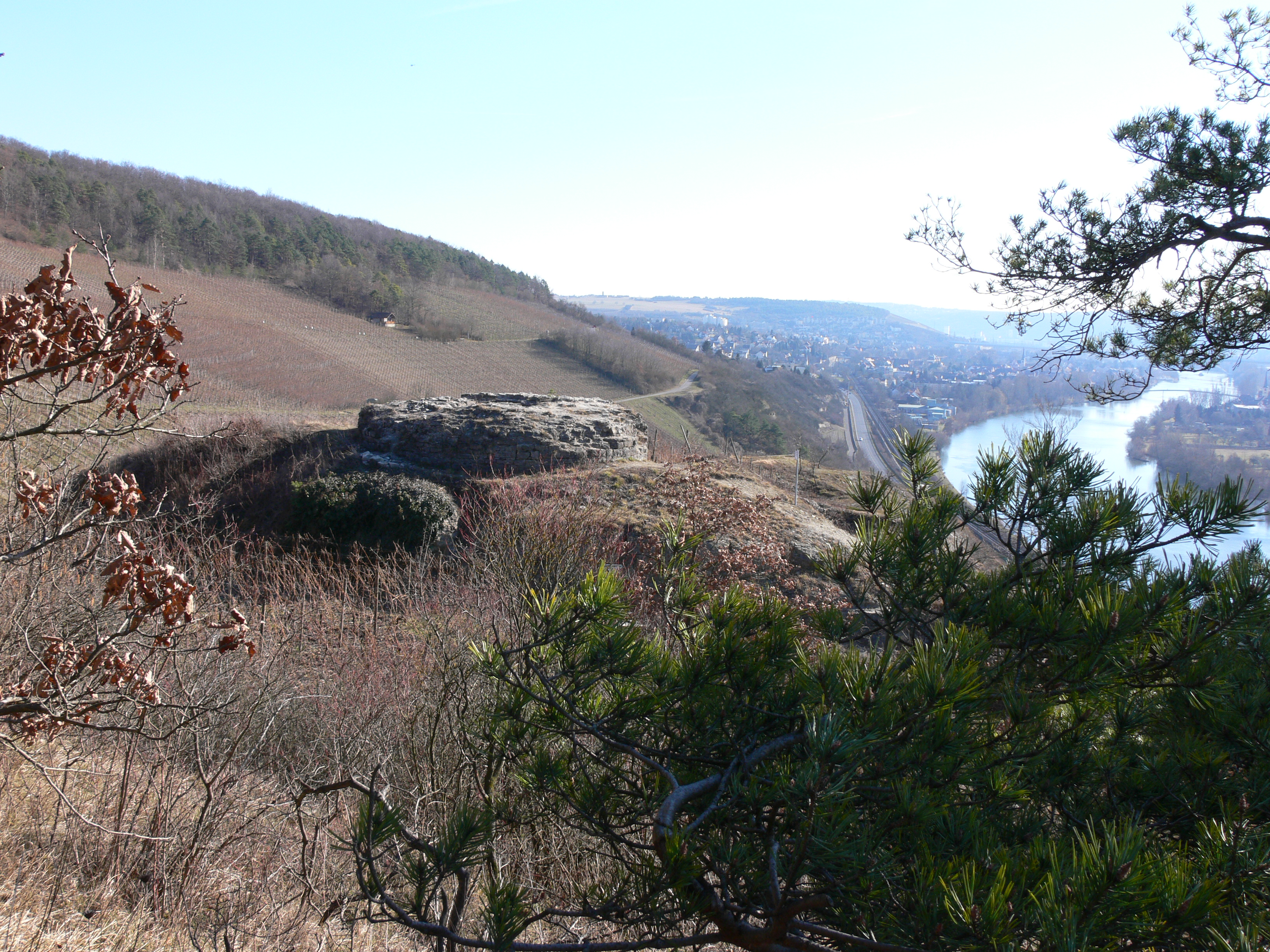 Ruine Ravensburg bei Thuengersheim, Blick von Vorburg nach Sueden ueber Halsgraben und Bergfried ins Maintal